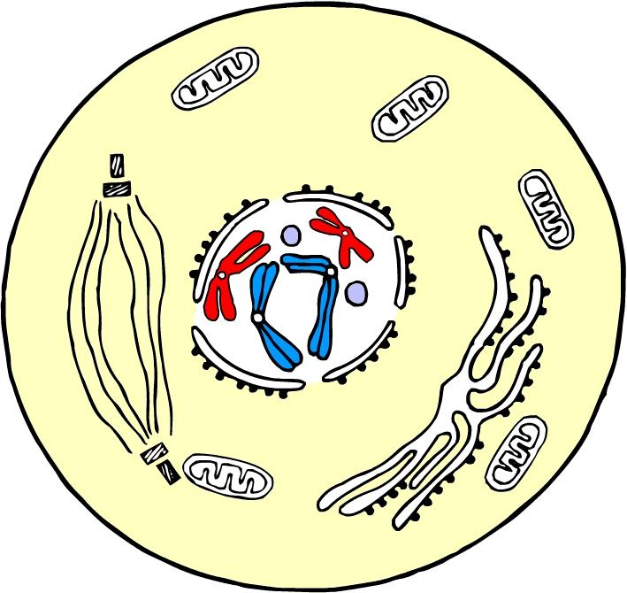 Prophase de la mitose cellulaire